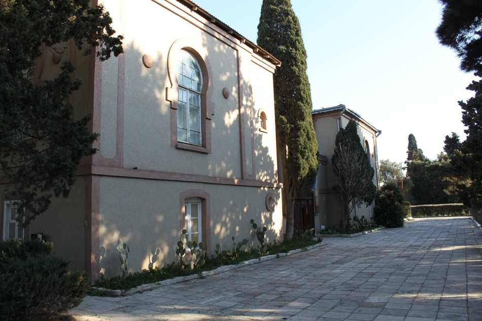 Мардакянский дендрарий